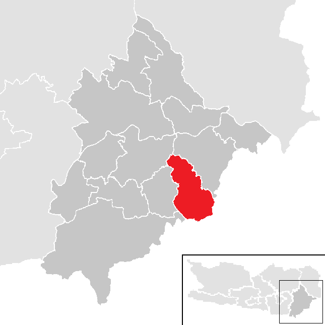 Bezirk Völkermarkt